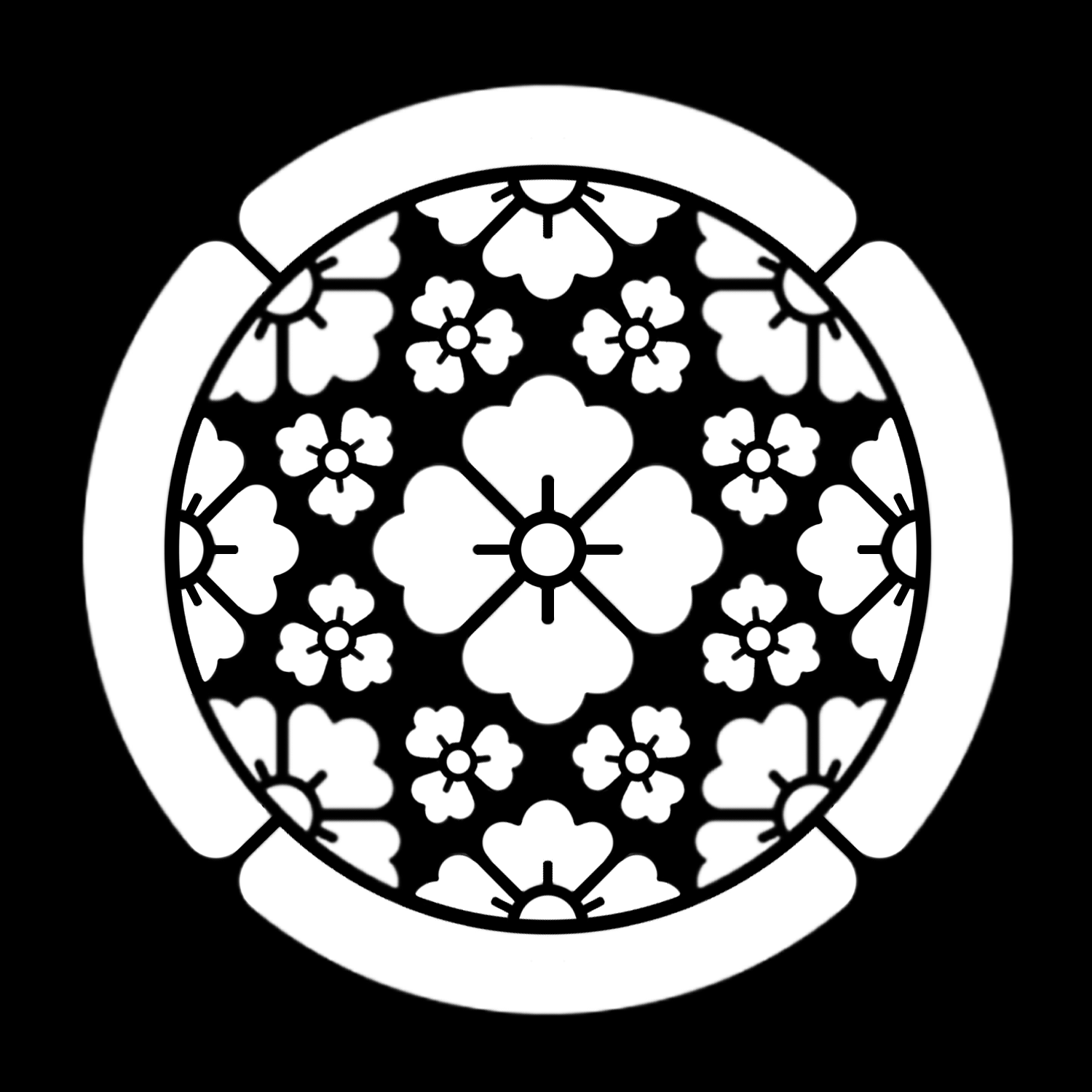 「徳大寺家花角」紋（染抜）